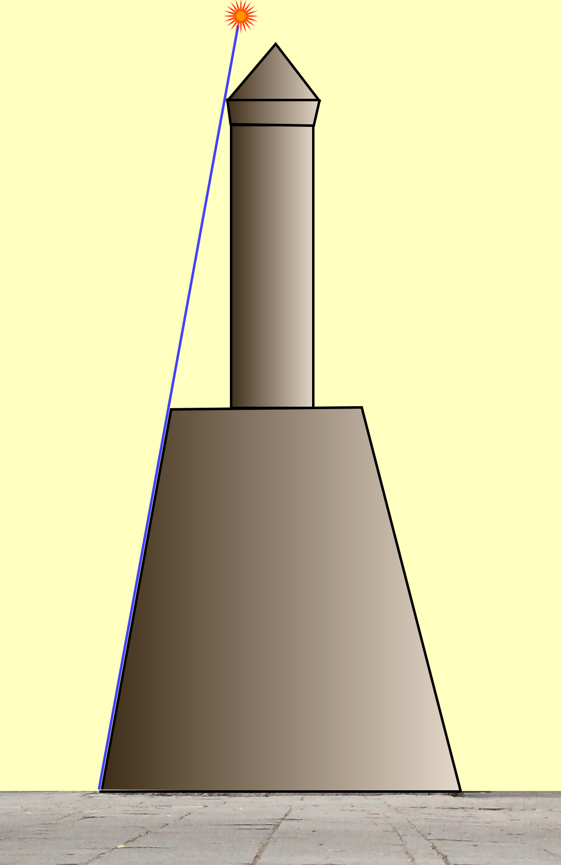 Schéma du gnomon conservé à l'observatoire ancien de Gaocheng